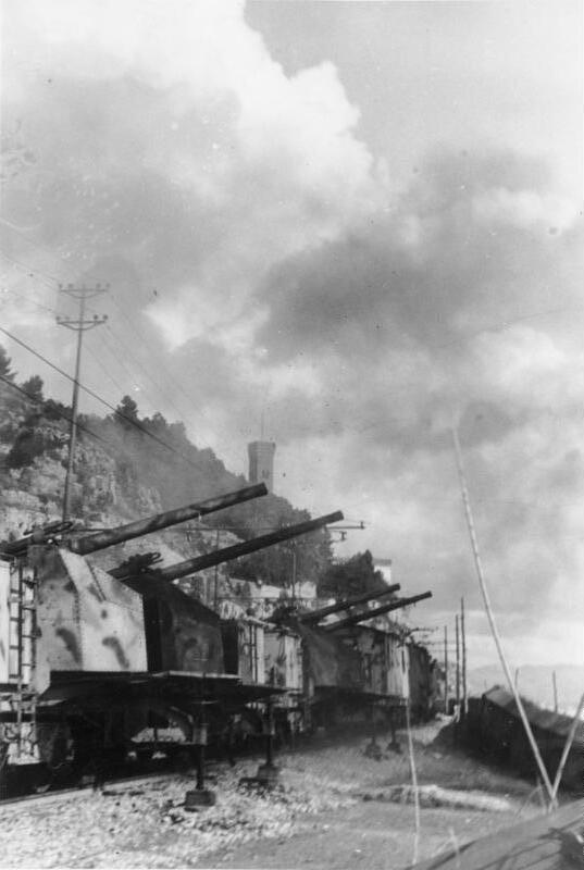 Scherl San Remo [Italien], 27.10.1944 [Aufnahmedatum] Marine Eisenbahnbatterie gegen Zerstörer Die Eisenbahnbatterie hat mit einer Salve das Feuer auf den feindl. Zerstörer eröffnet. Marine-Kriegsberichter: Haring